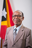 Ernesto Fernandes, Abgeordneter des Nationalparlaments Osttimors